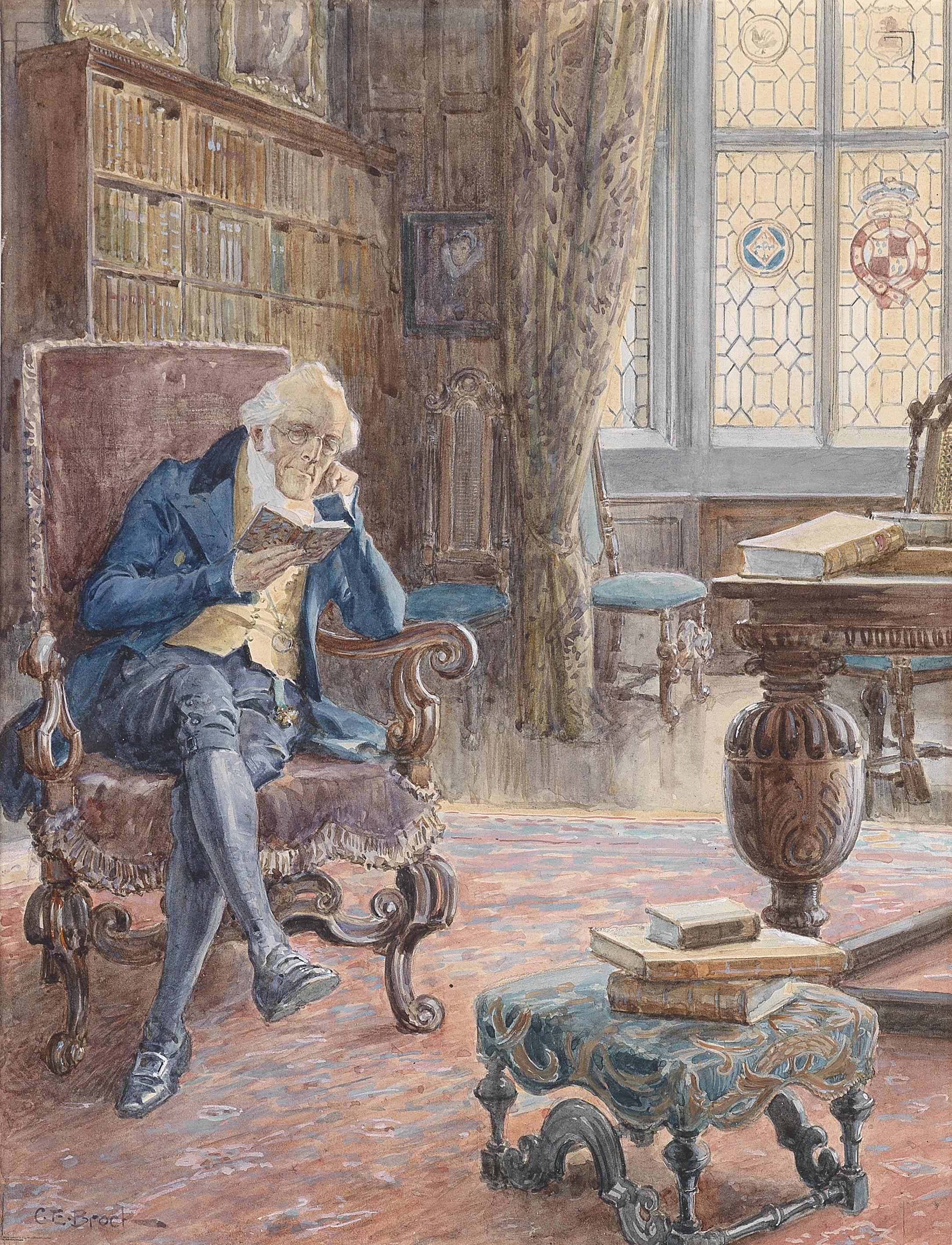 Bibliothek mit Lesendem